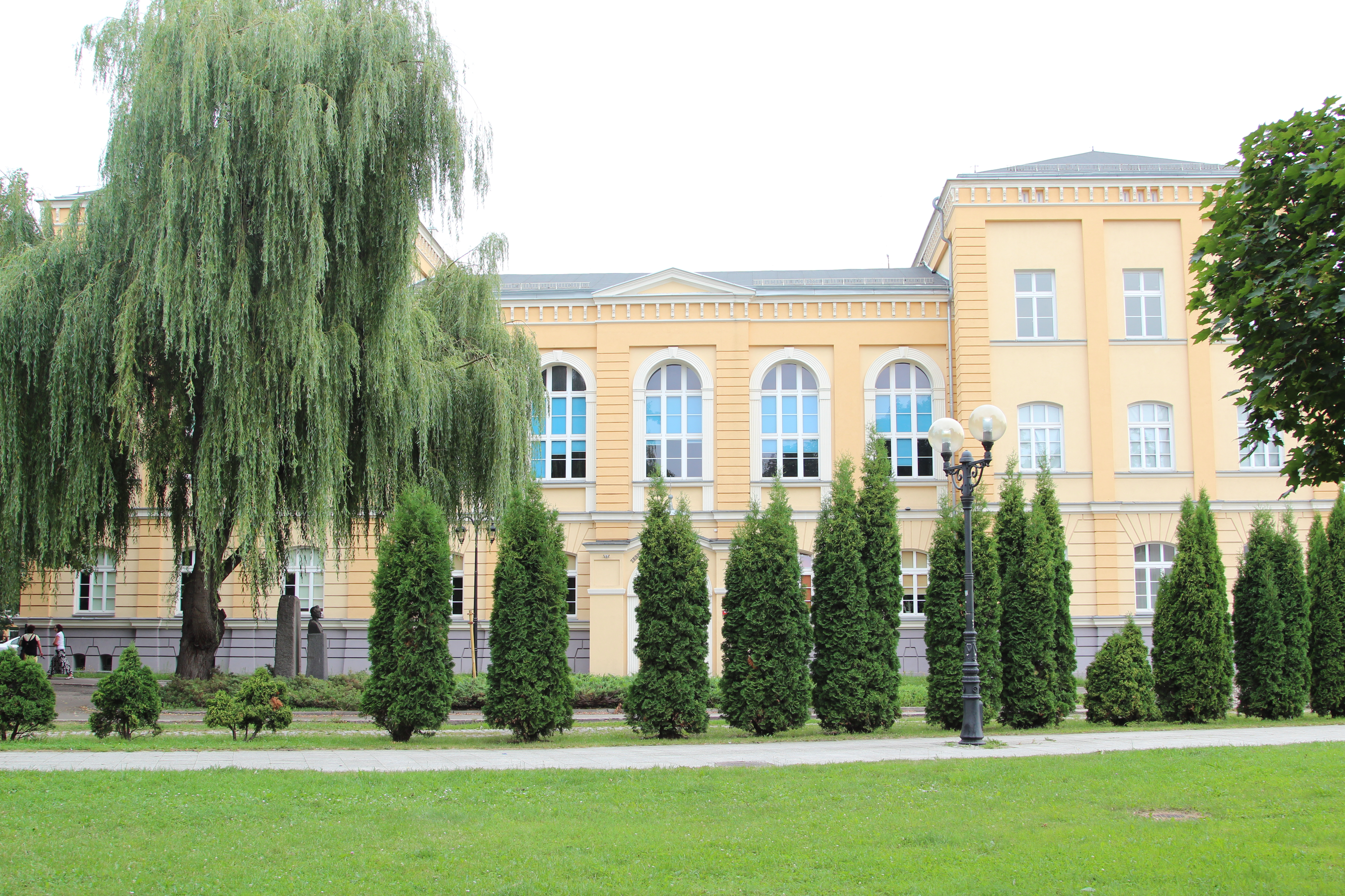 Elbląg, szkoła tzw. Hansa Schule, ob. Biblioteka Pedagogiczna (dec. dom), 1900